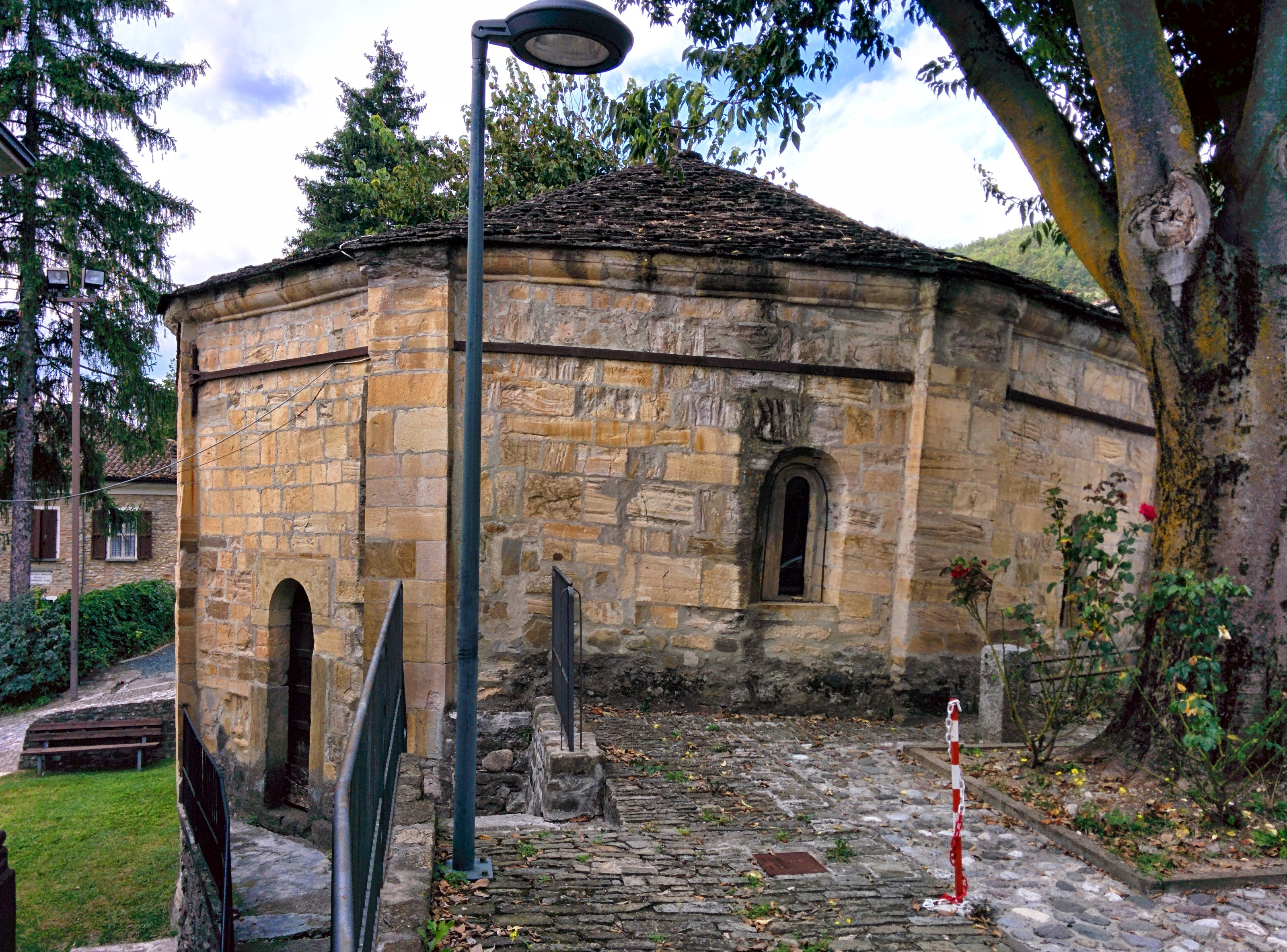 Battistero This is a photo of a monument which is part of cultural heritage of Italy.